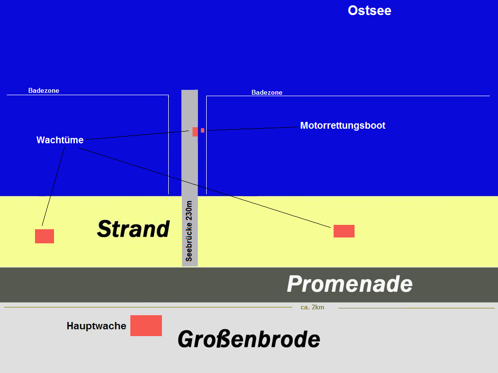 Schema eines Wachgebietes einer Wasserrettungsstation am Beispiel Großenbrode